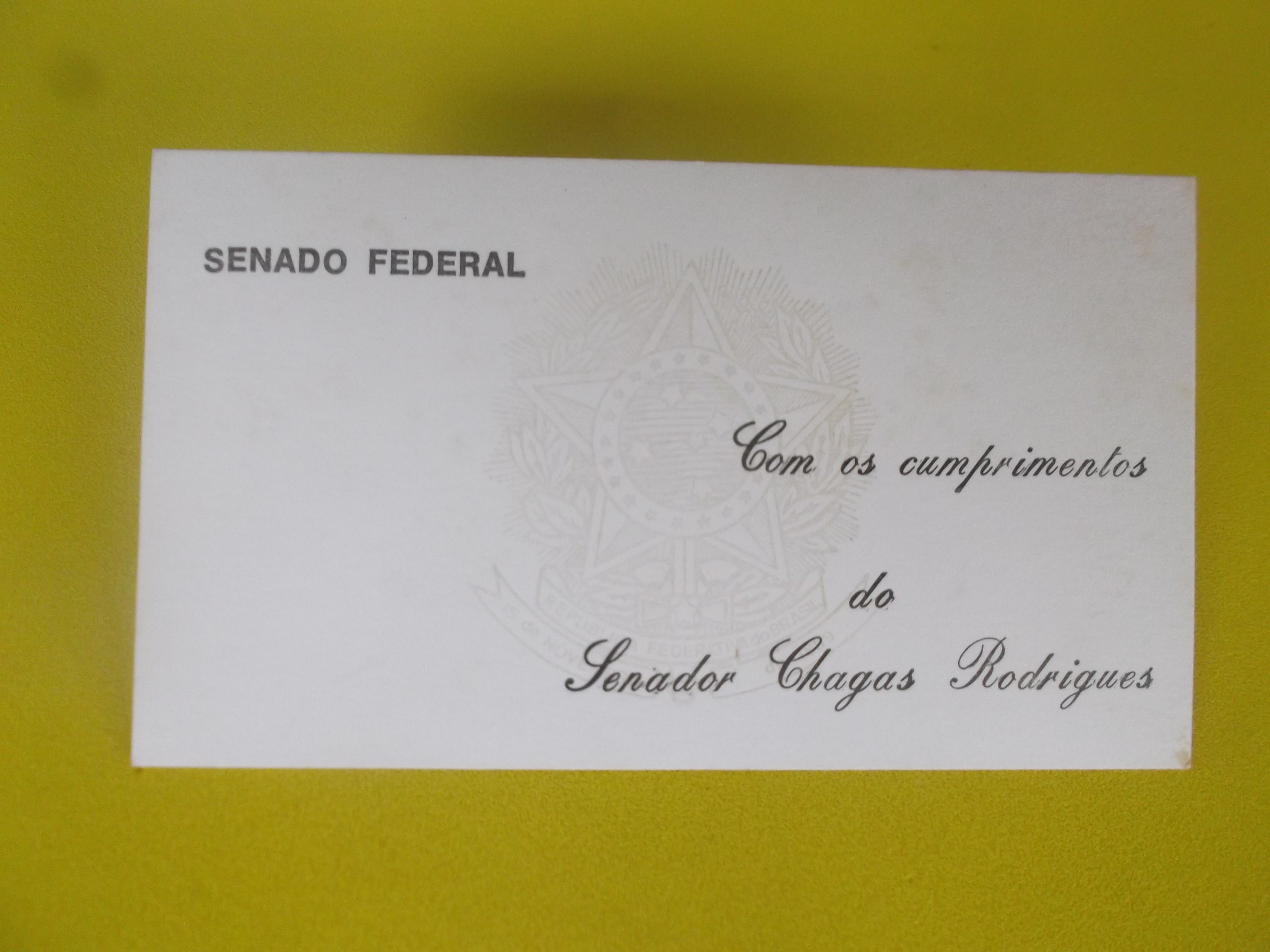 Cartão de visitas, não autografado do senador Chagas Rodrigues.